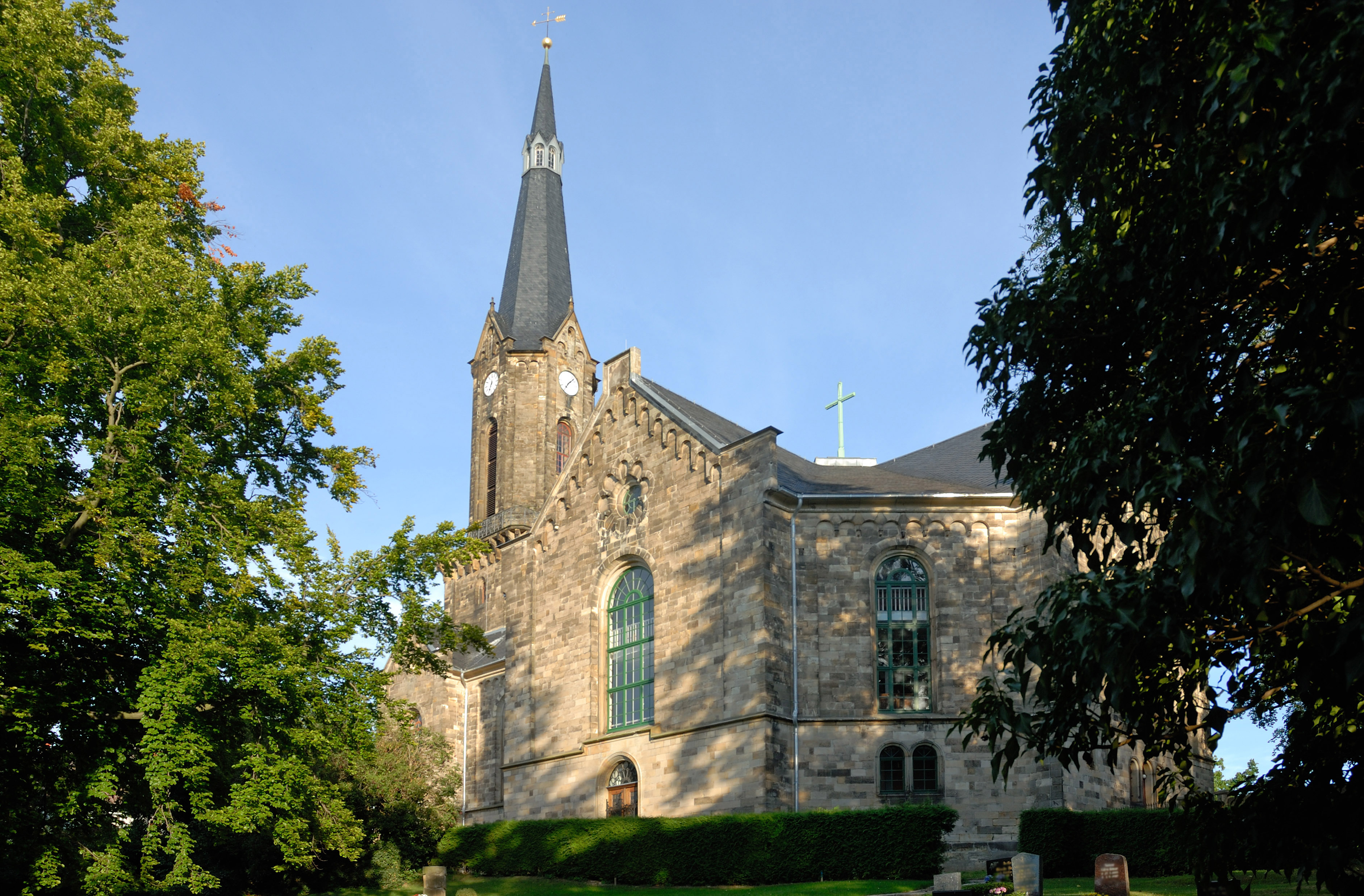 St Viti Kirche